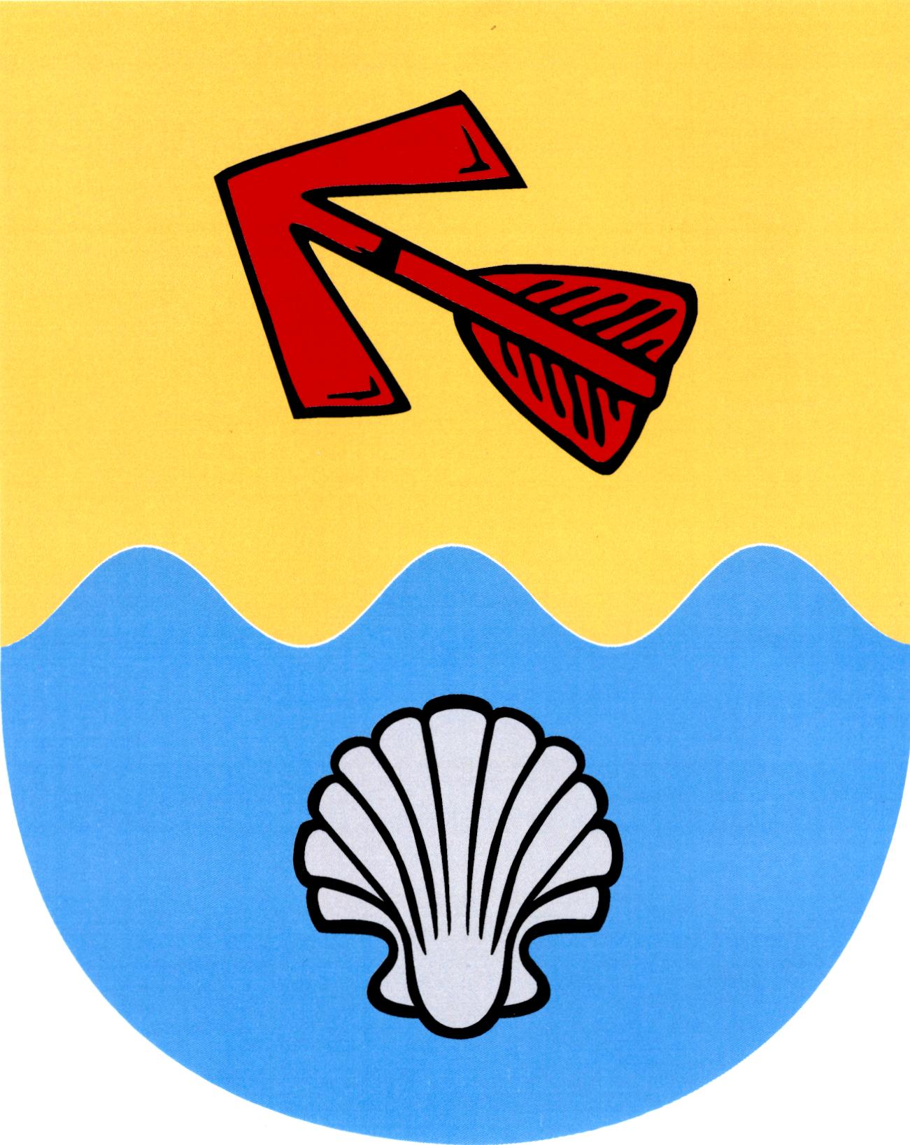 Znak obce Boršov nad Vltavou